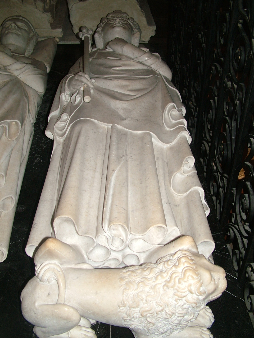 Grab König Philipps IV. von Frankreich in Saint-Denis